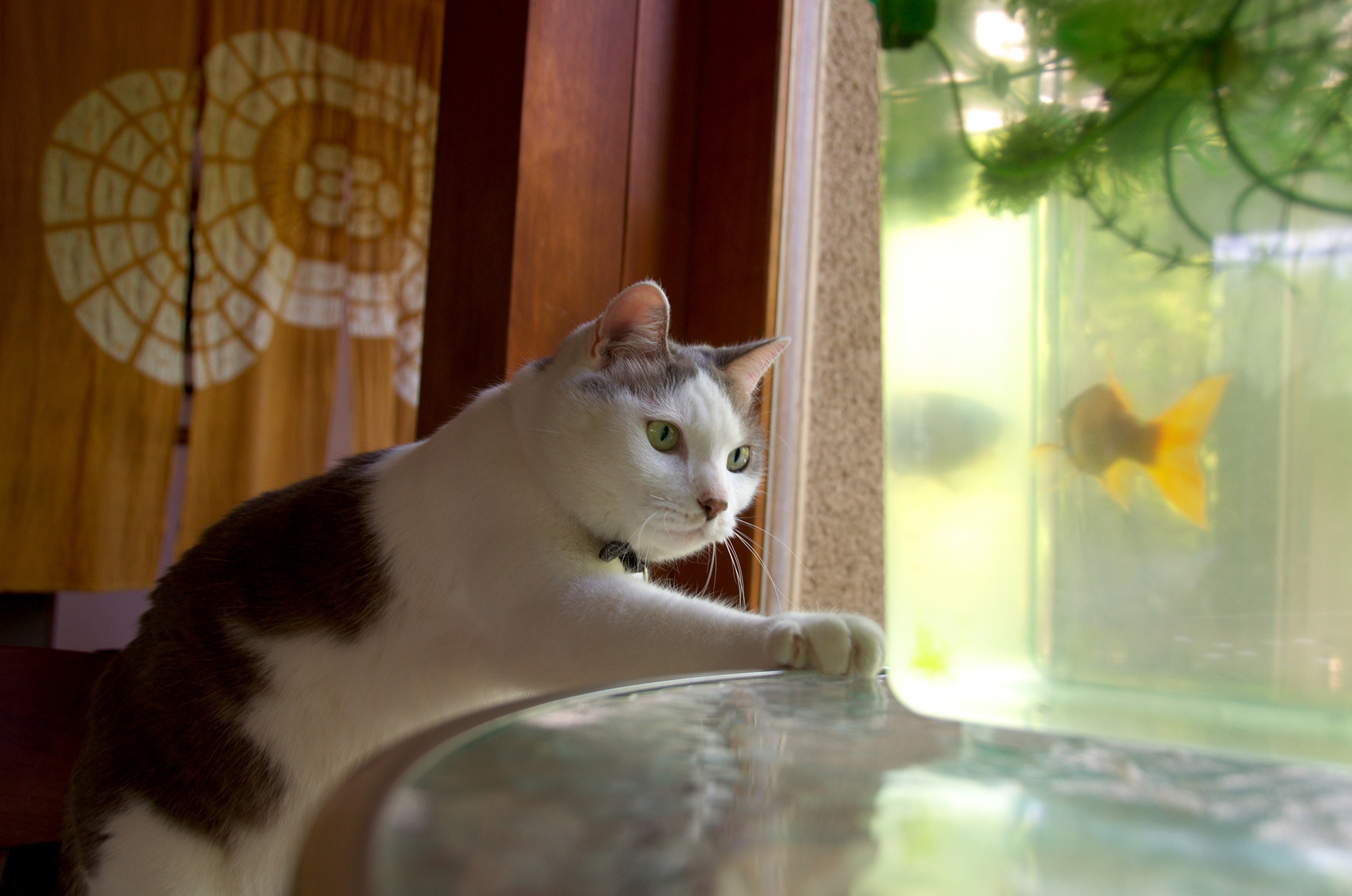 金魚を狙う猫